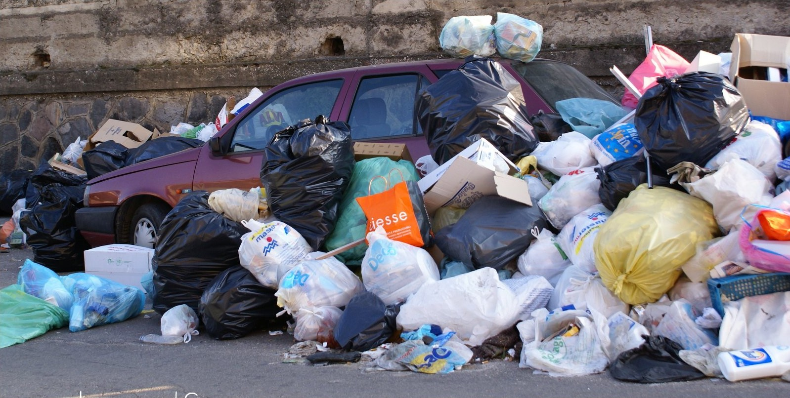 Aversa. Stazione di Aversa.